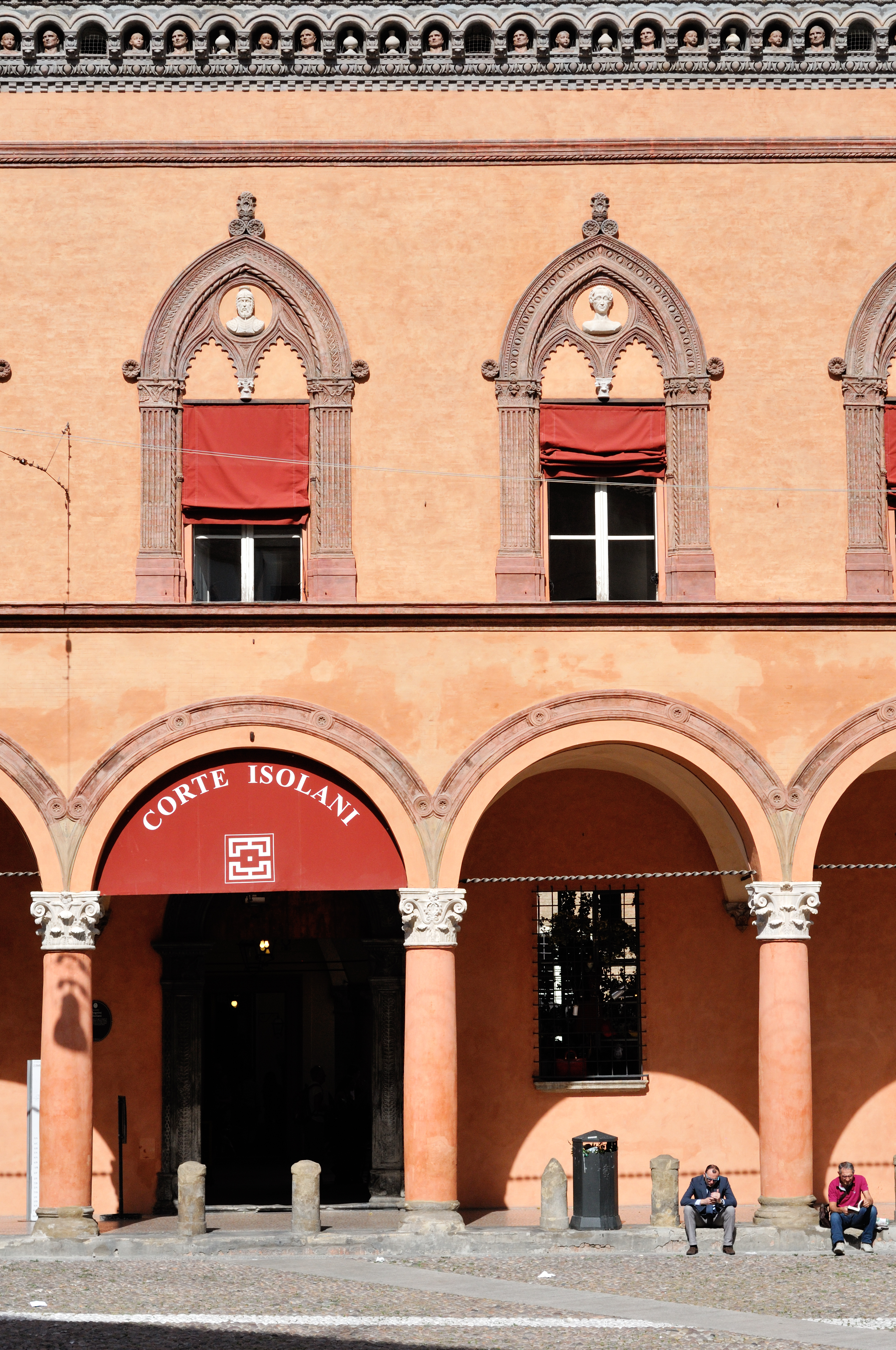 Casa Isolani (solo esterni) This is a photo of a monument which is part of cultural heritage of Italy.